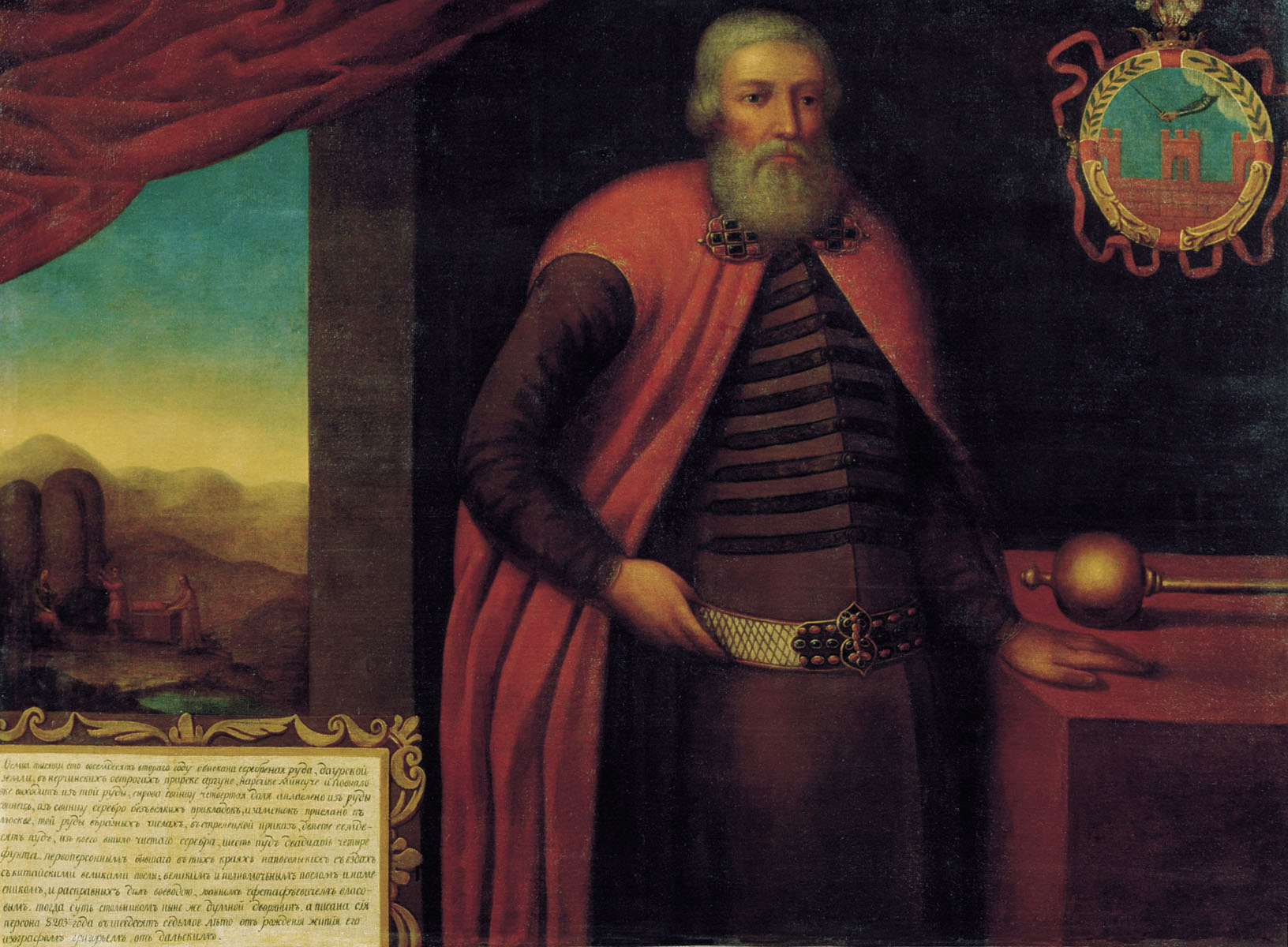 Портрет воеводы Ивана Евстафьевича Власова. Нижегородский художественный музей